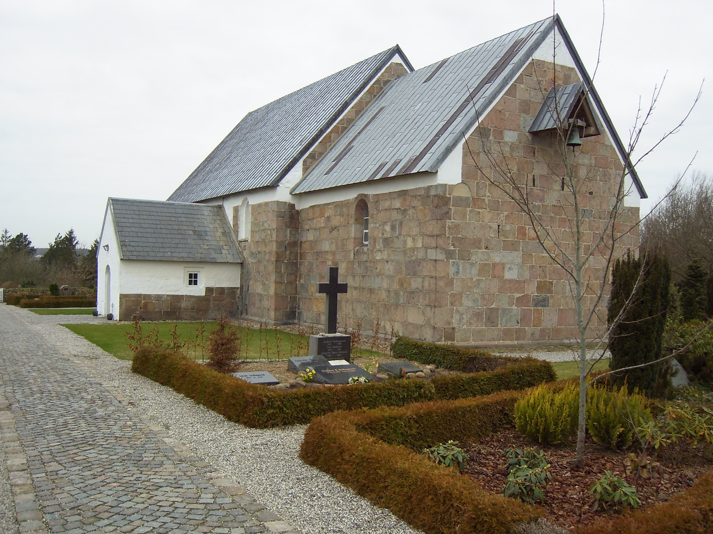 Hover kirke set fra sydøst